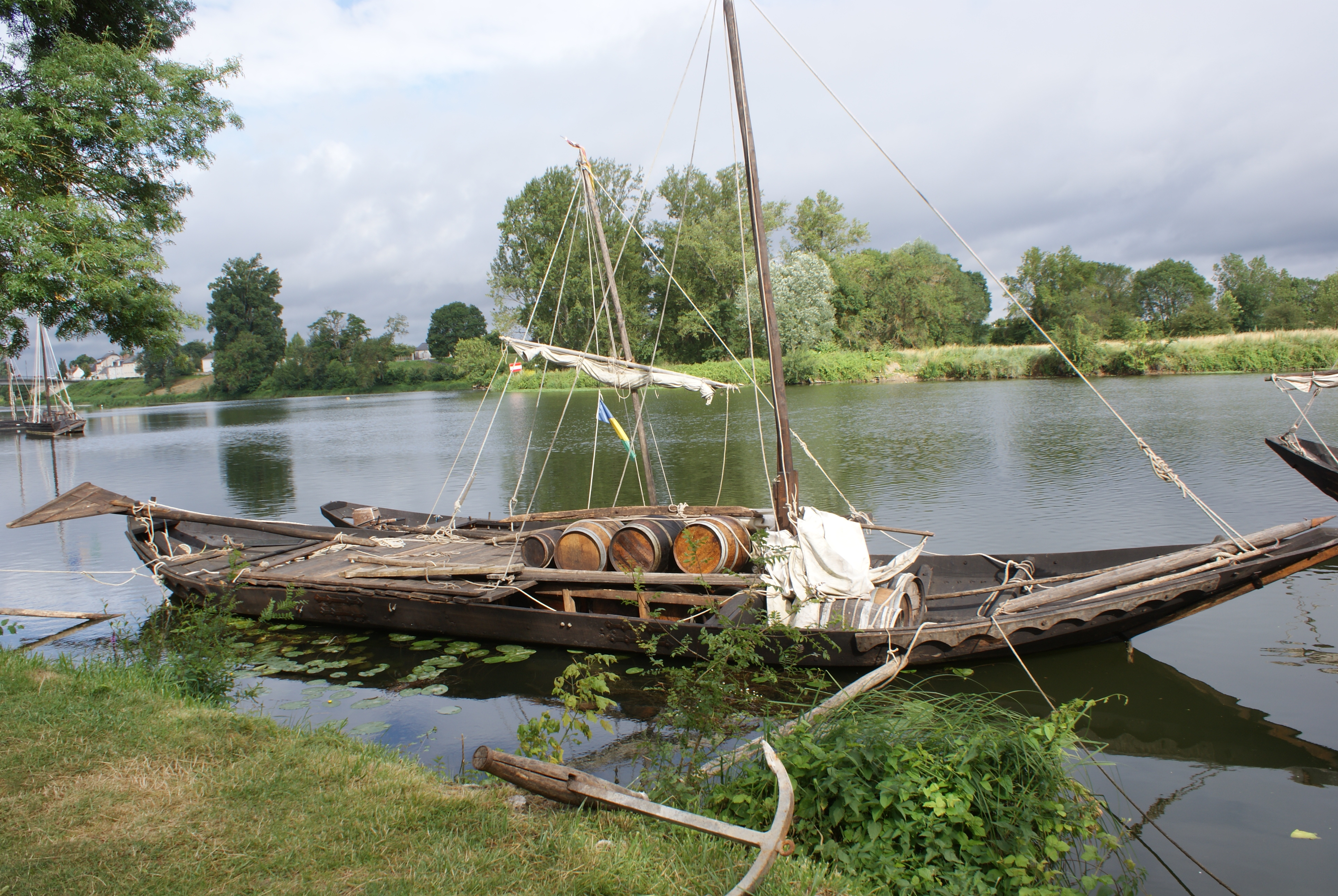 Scute de savonnieres (37) en France - Dame Périnelle